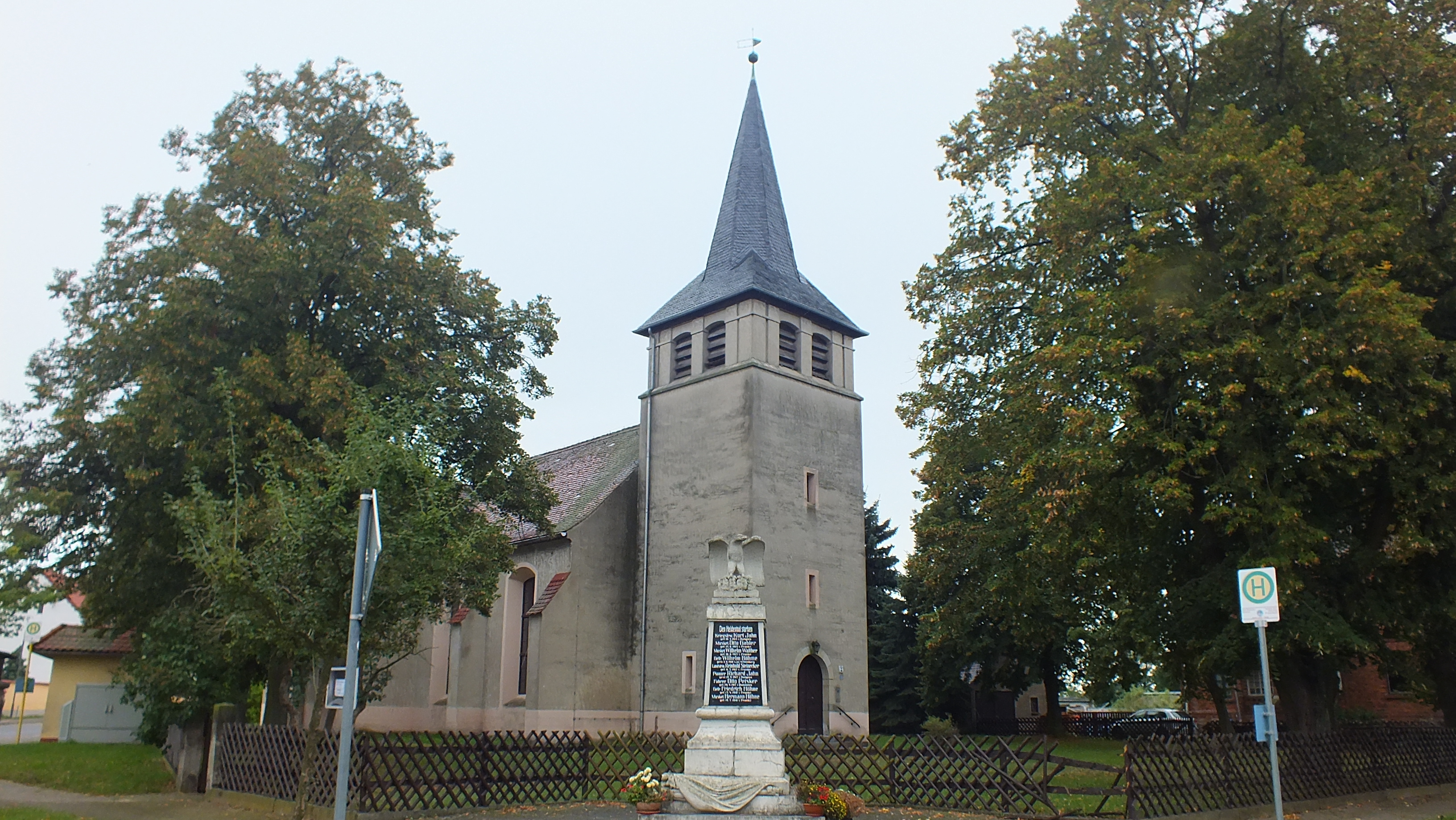 Denkmalgeschützte Kirche in Gorsdorf